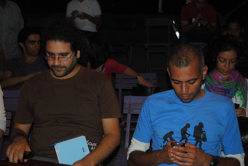 Alaa Abdel Fatah and Hossam El Hamalawy